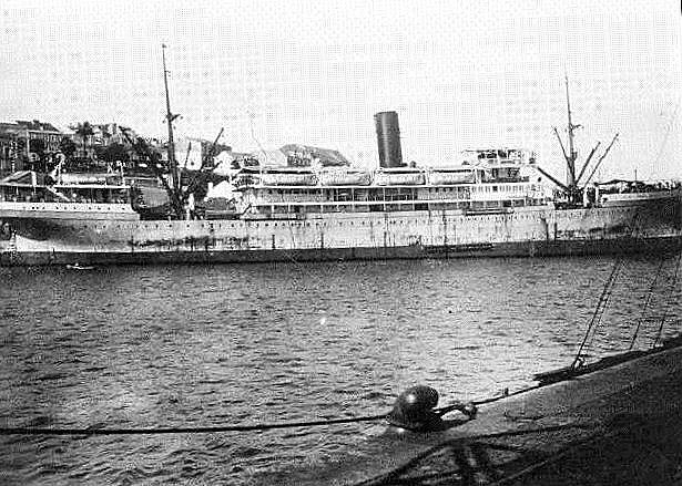 Paquete Moçambique